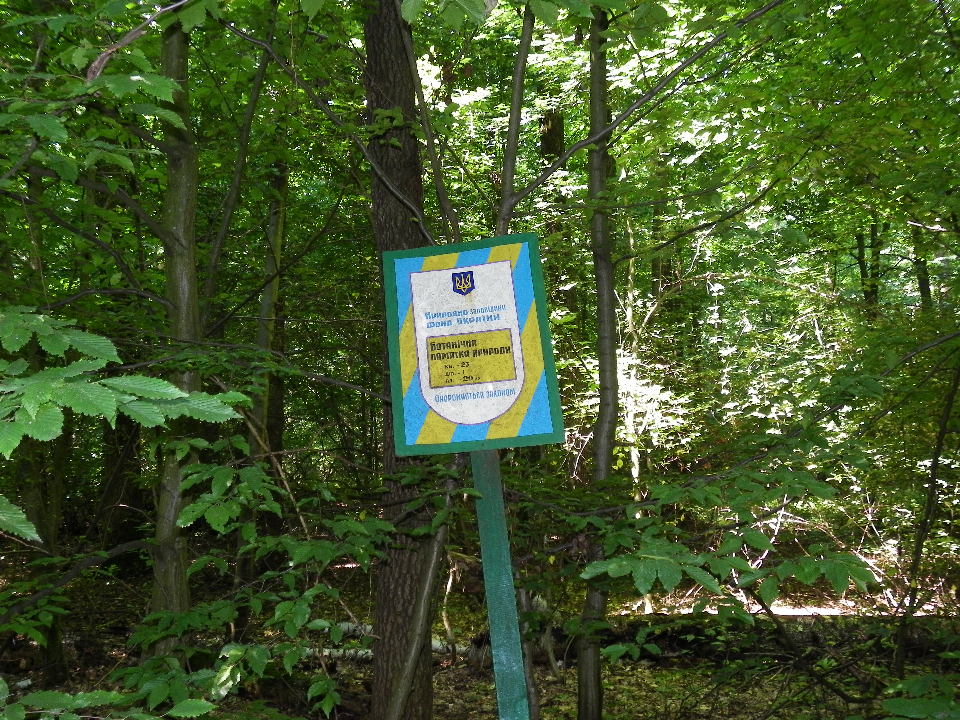 Урочище «Дубина», Літинський район, Громадська с/р, Соснівська с/р Літинське лісництво, кв. 23, д. 1